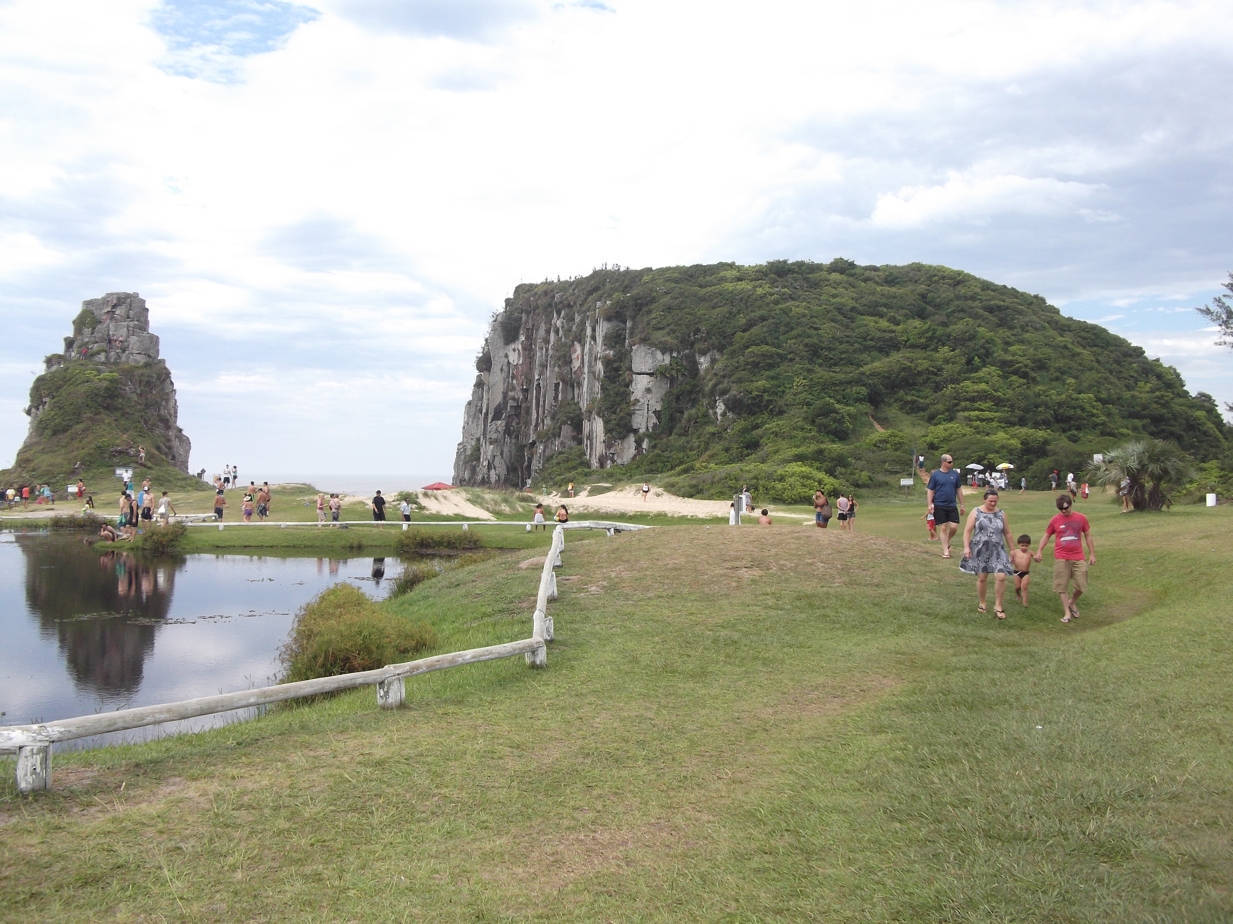 Torres